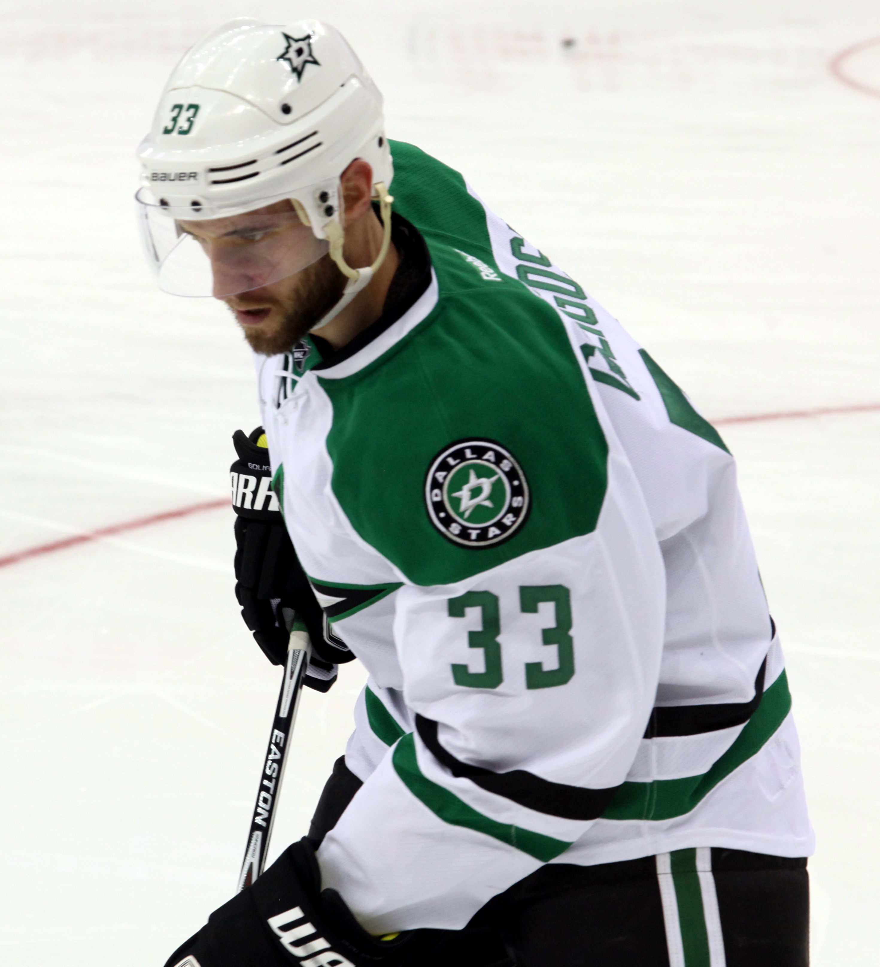 Goligoski in October 2014.